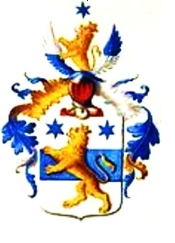 Wappen derer von Löwenstern, tingierte Lithographie